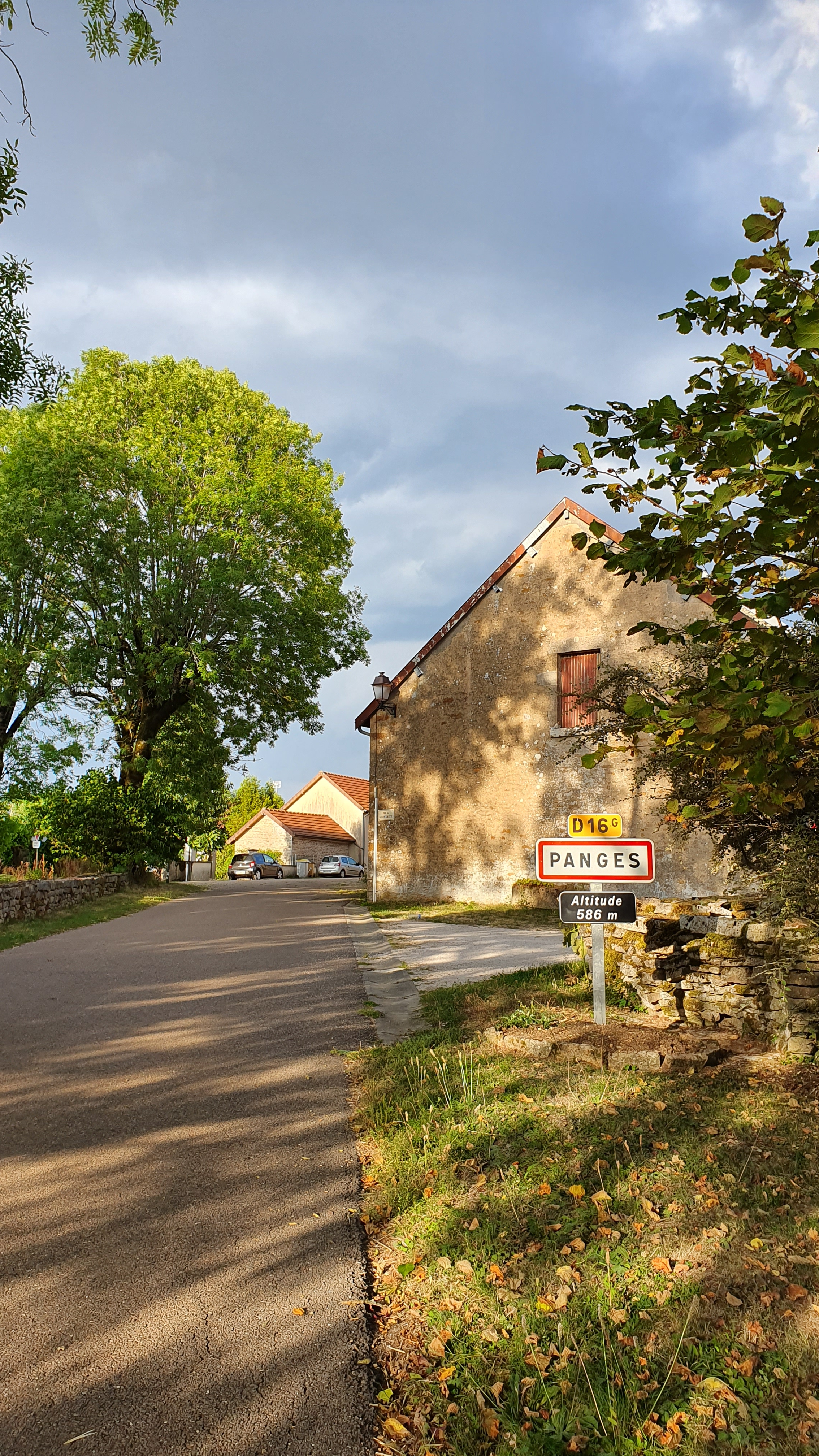 commune de France